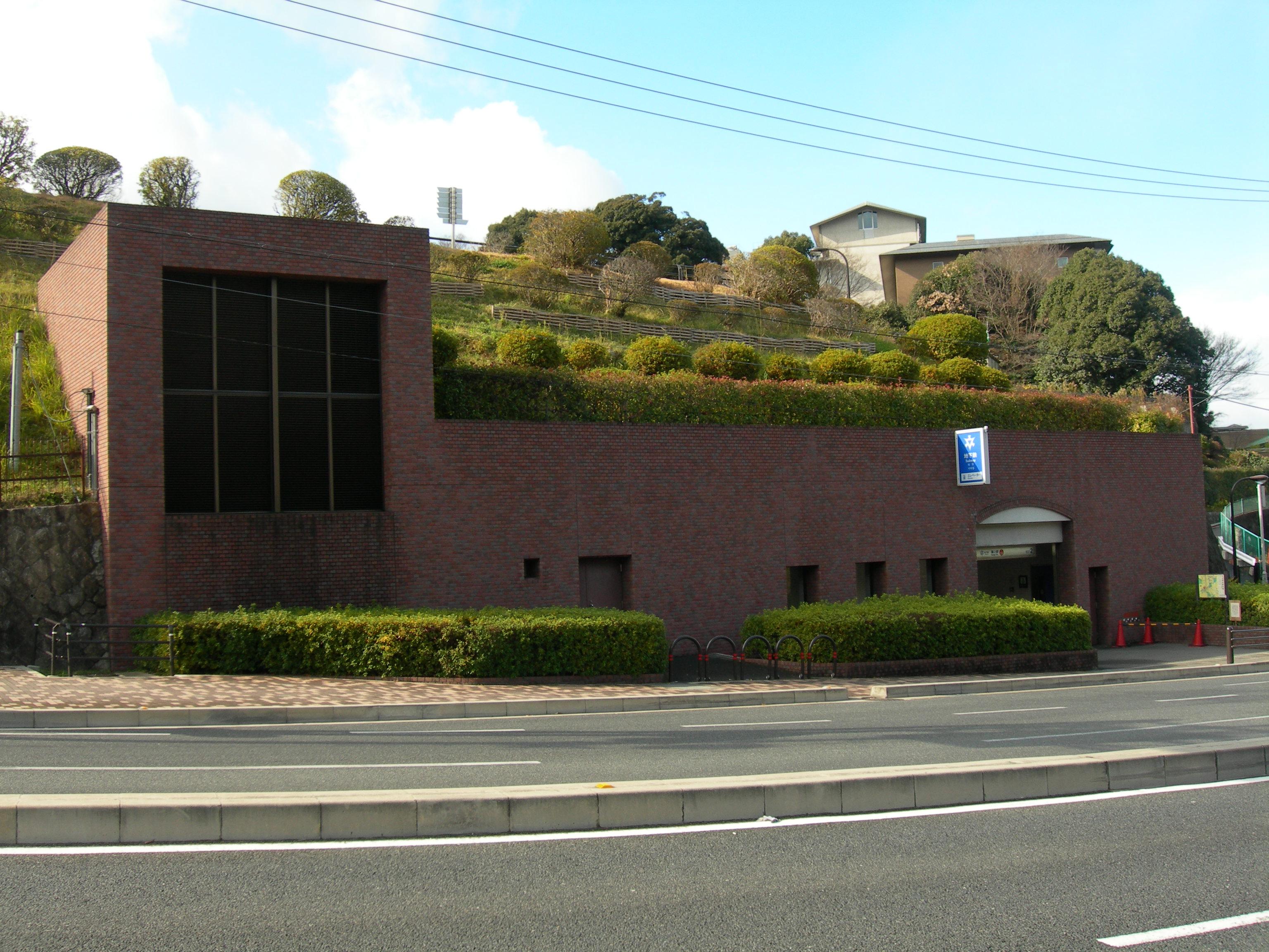 京都市営地下鉄東西線蹴上駅2番出口